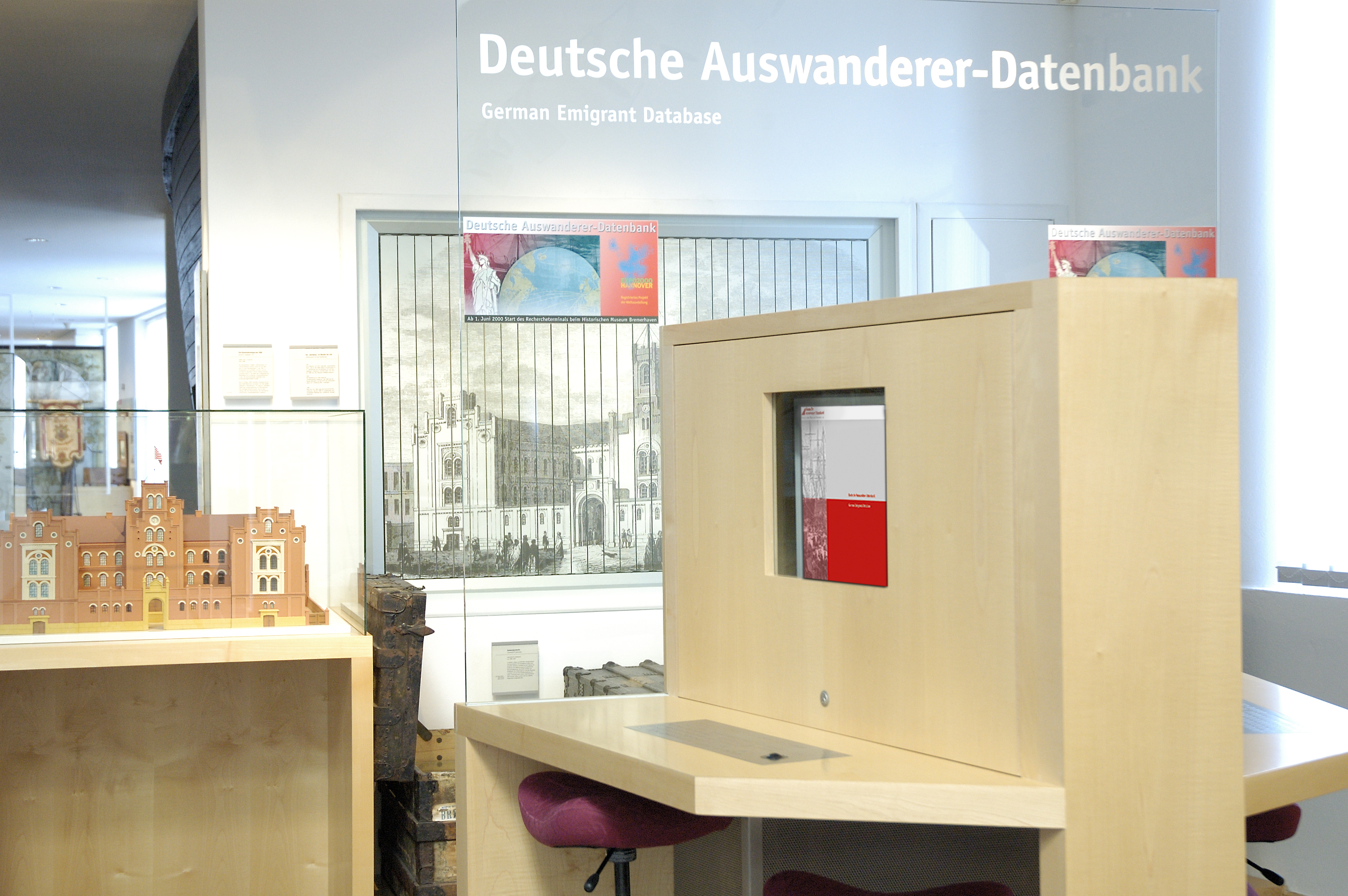 Terminal der Deutschen Auswanderer-Datenbank im Historischen Museum Bremerhaven